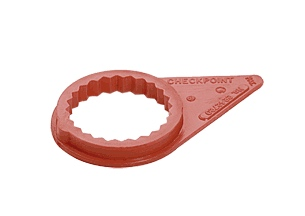 Der Checkpoint ist der ursprüngliche Radmutterindikator und die einfachste Möglichkeit, Radmuttern zu sichern. Zwei nebeneinander positionierte Indikatoren zeigen mit den Spitzen zueinander. Löst sich eine Radmutter, wird das sichtbar. Für alle gängigen Schlüsselweiten von Größe 17 bis 50